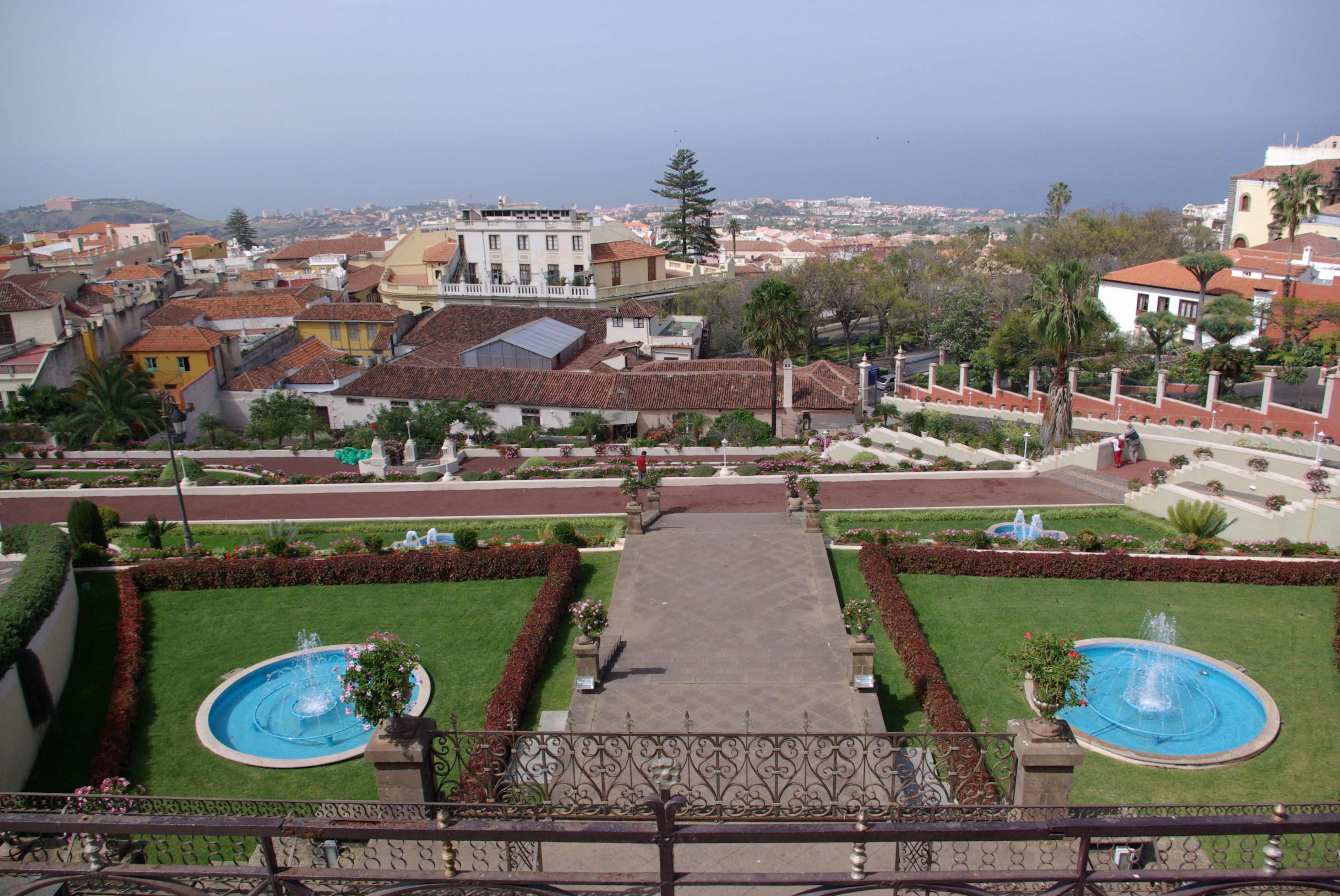 Teneriffa, La Orotava, Jardines Marquesado de la Quinta Roja